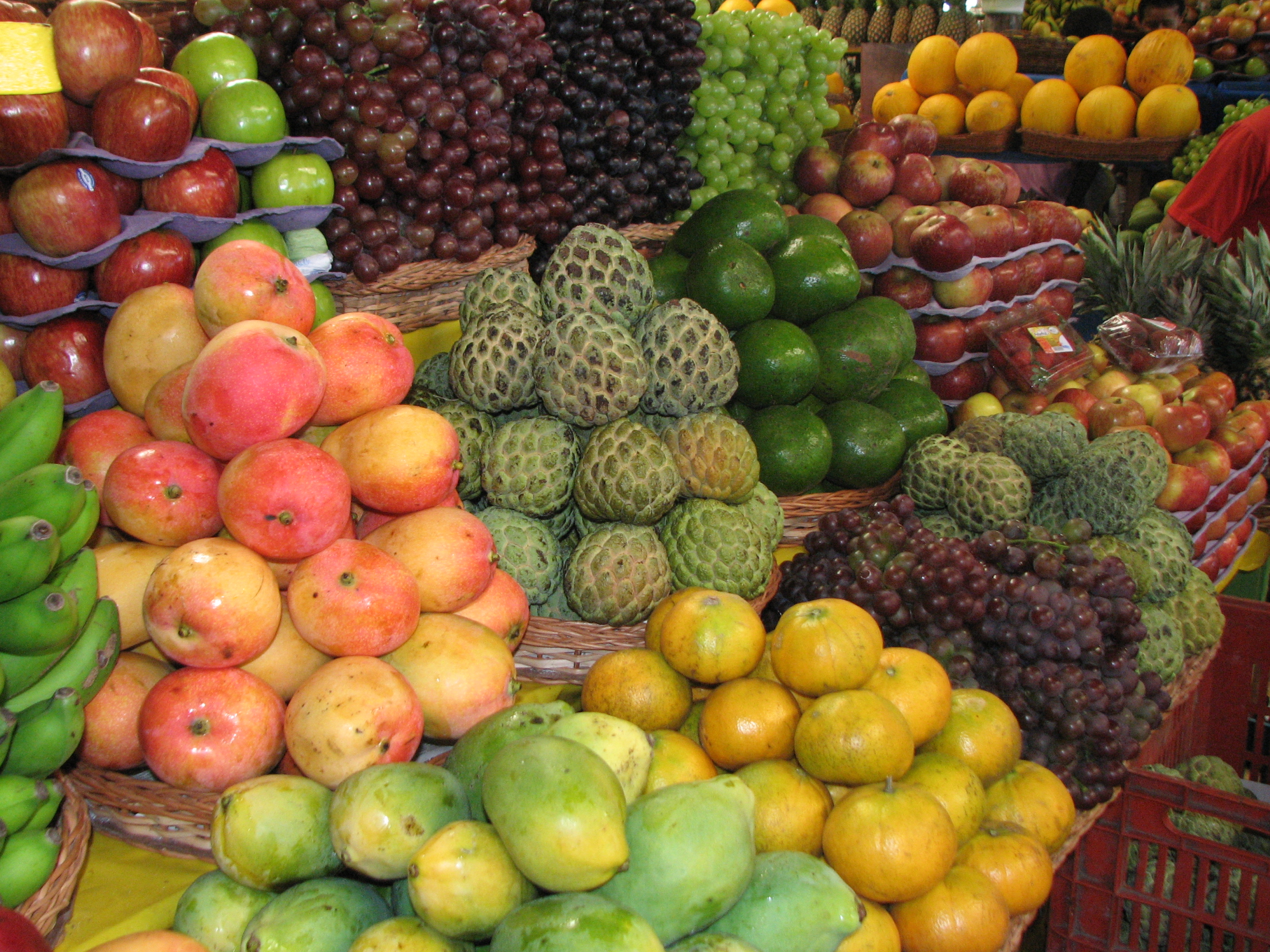 Frutas no Mercado Albano Franco, Aracaju.